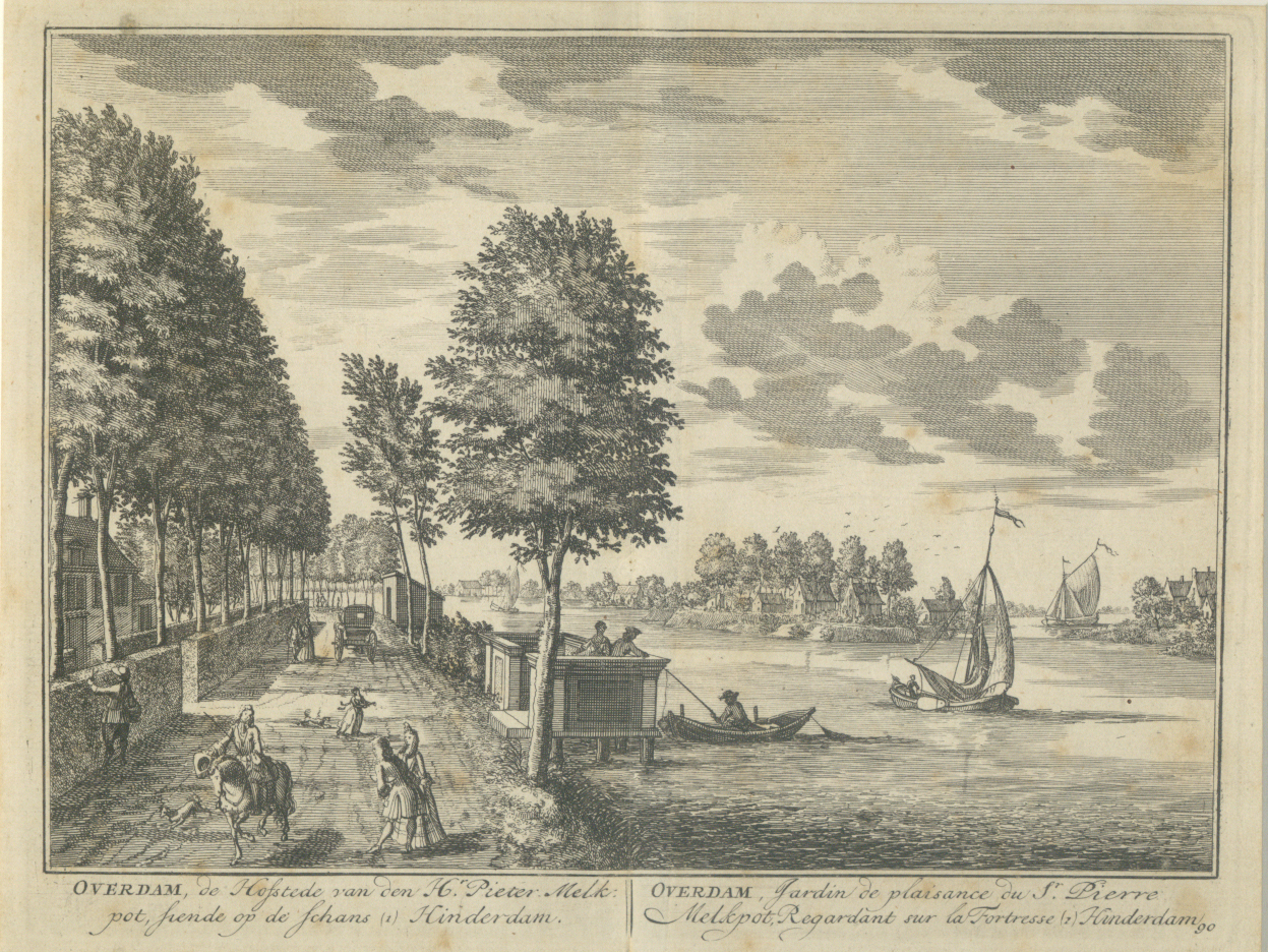 Prent uit "De Zegepralende Vecht" met daarop afgebeeld de hofstede Overdam aan de rivier de Vecht bij de Hinderdam. Middenin de prent is tevens een waterbank op palen aan de rivier te zien.